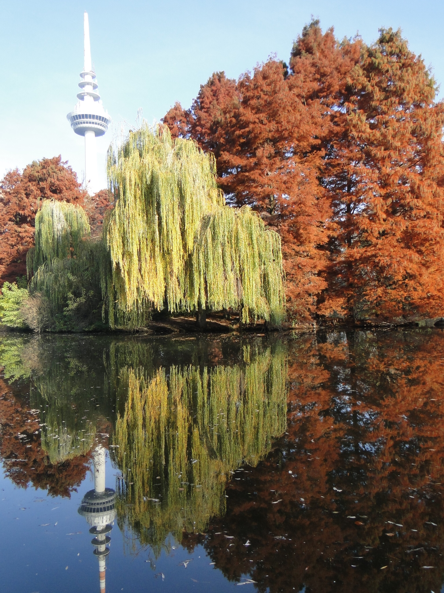 Mannheim - Deutschland